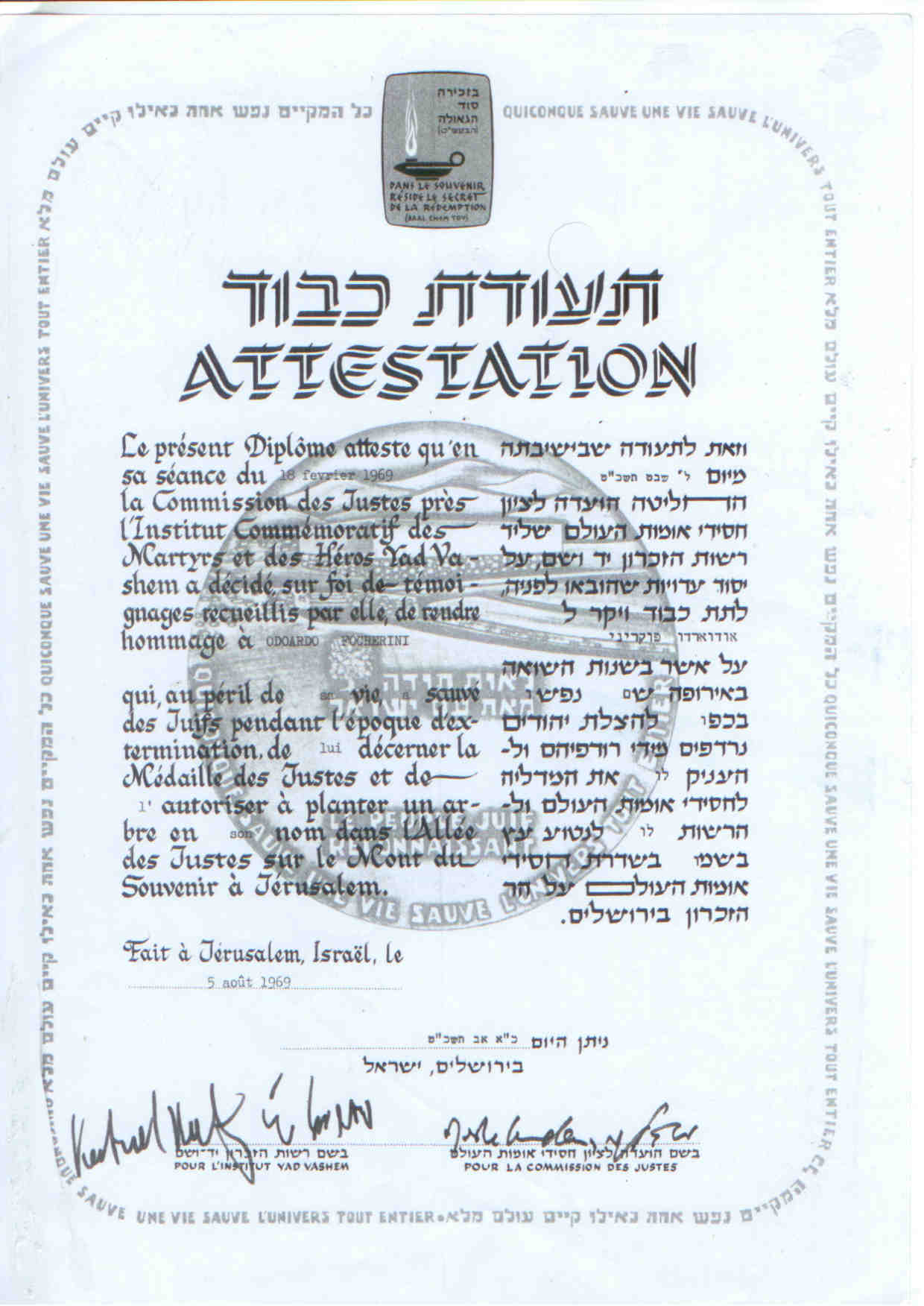 תעודת חסיד אומות העולם שהוענקה לפוקריני בשנת 1969 על ידי יד ושם